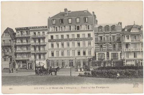 Anciens hotels Bellevue et des étrangers à Dieppe (France). Avant 1914.